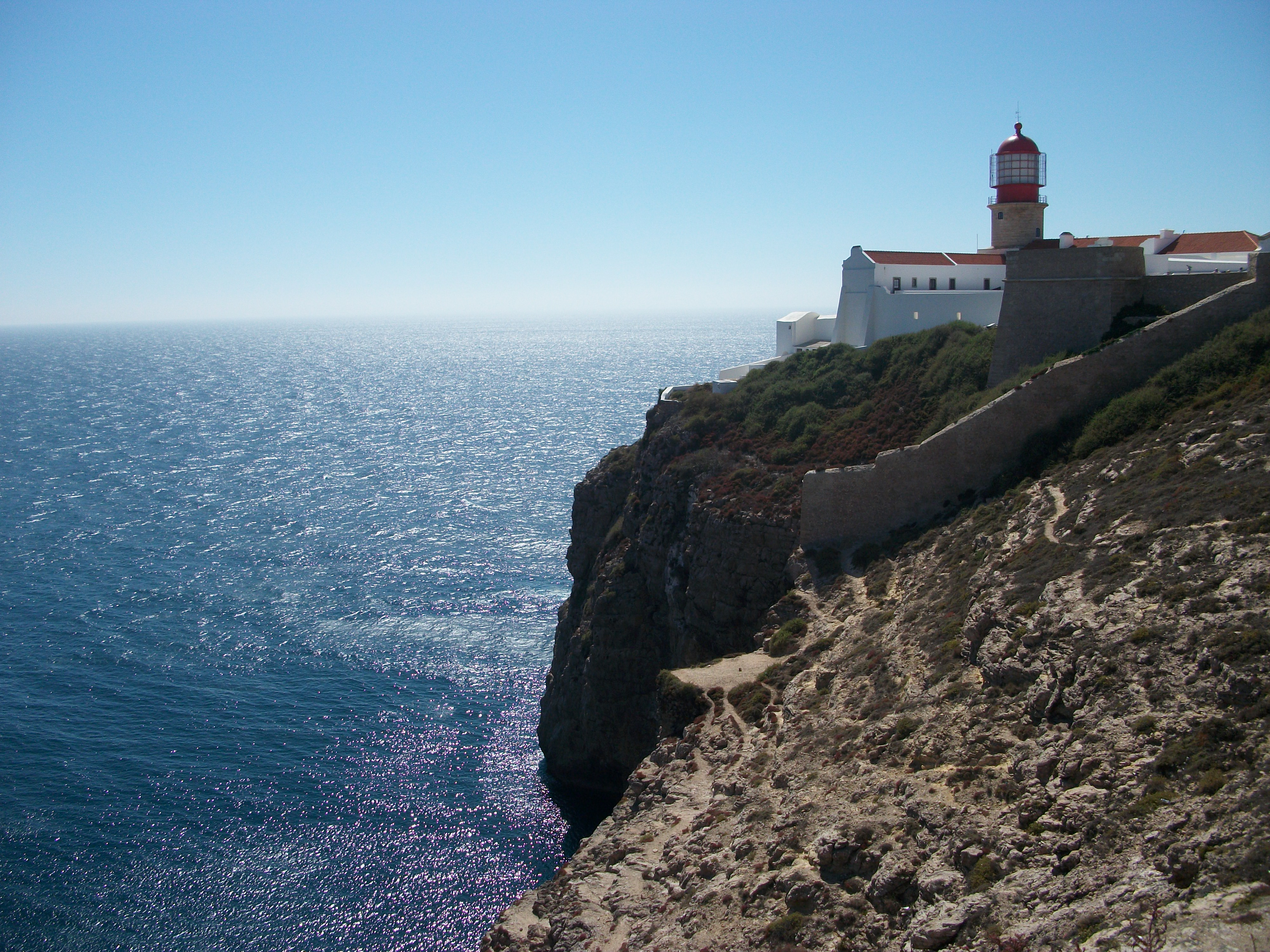 Foto Faro Cabo de San Vicente This file was uploaded for Wiki Loves Monuments in Portugal with the unique identifier 97026672.